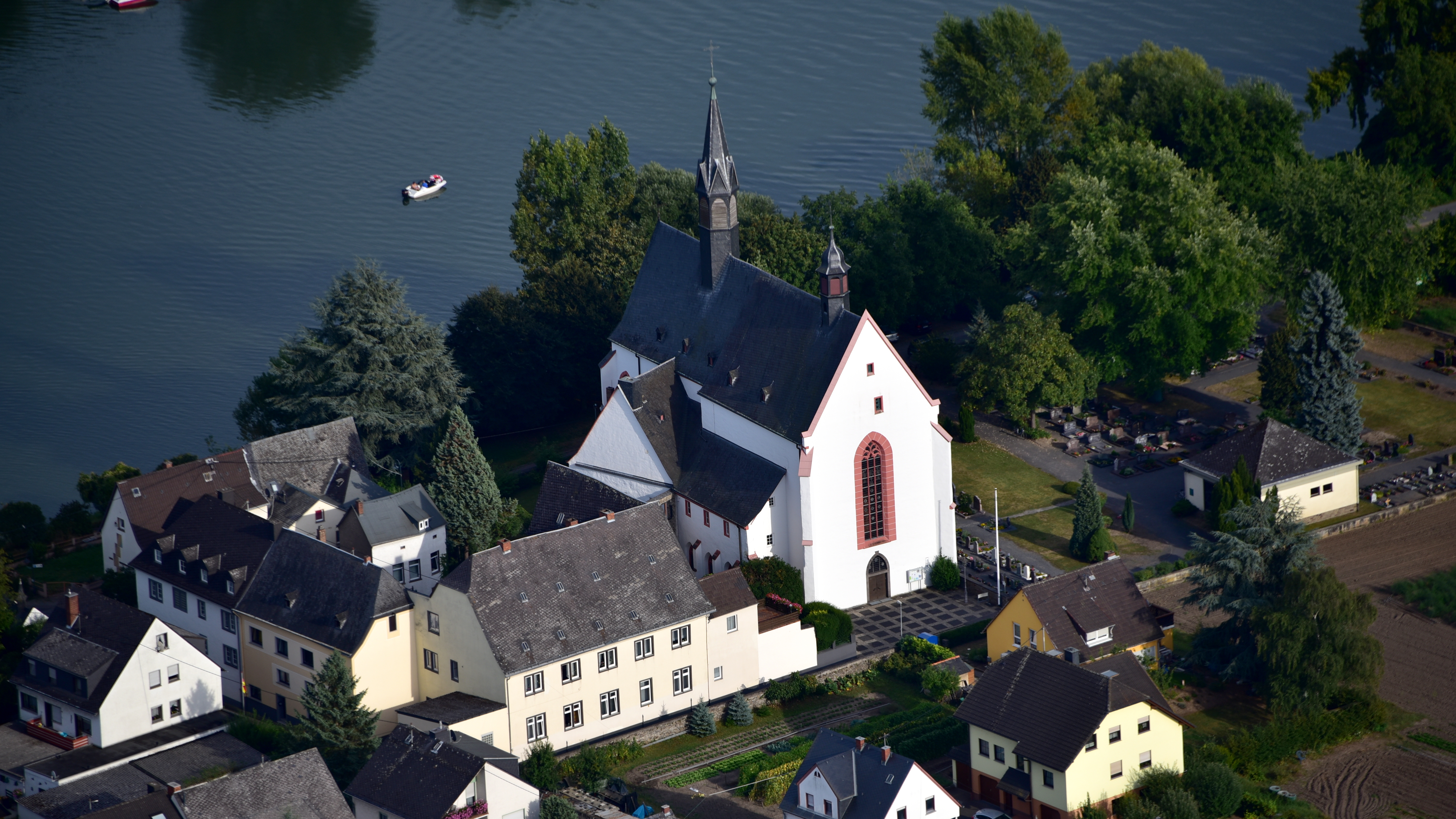 St. Georg (Niederwerth), Luftaufnahme (2016)